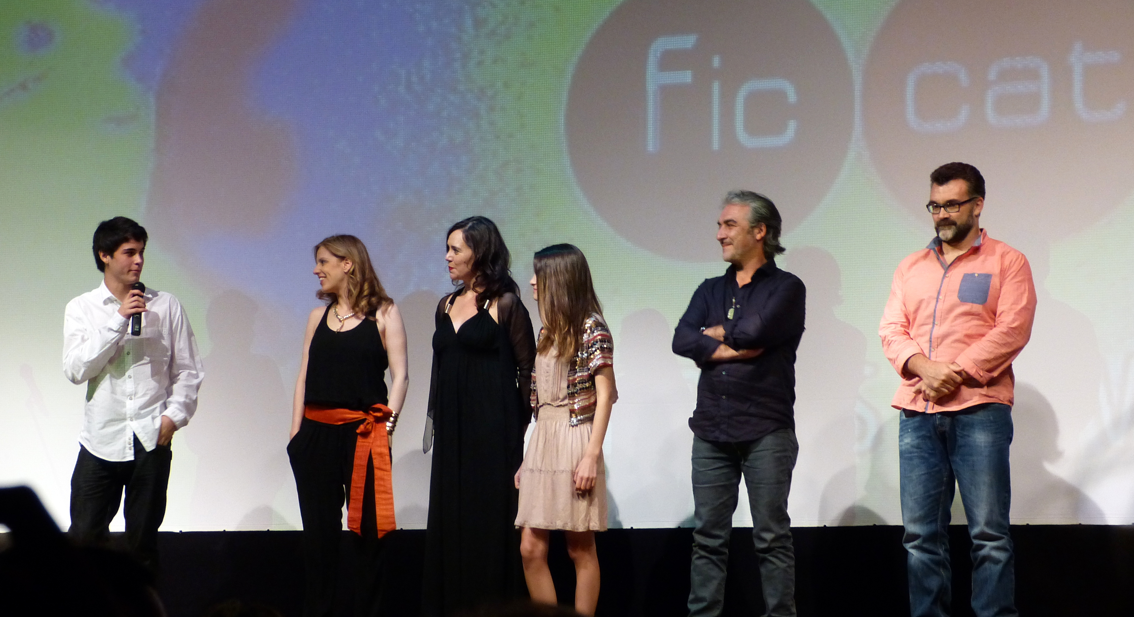 6a edició del fic-cat (Festival Internacional del Cinema en Català), celebrat a Roda de Barà, on es va presentar la pel·lícula "Fill de Caín" dirigida per Jesús Monllaó.